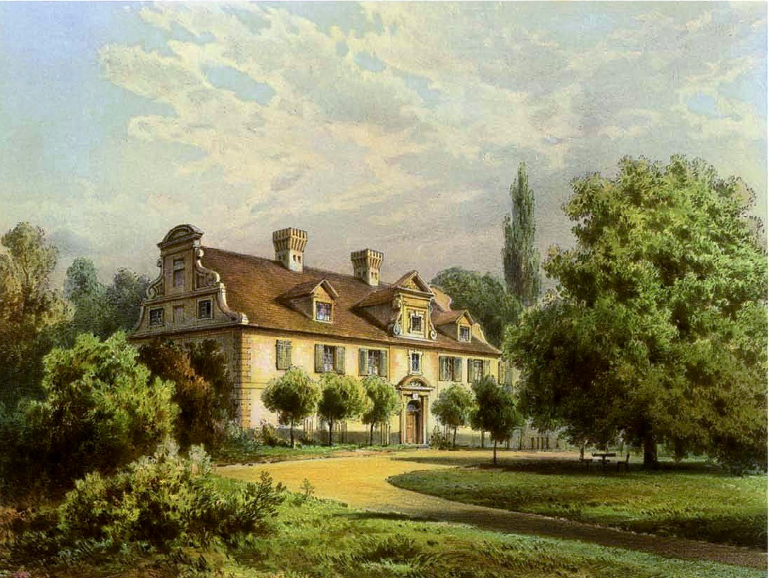 Gutshaus Kahren, Kreis Cottbus, Provinz Brandenburg